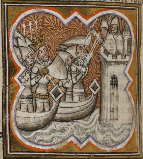 Siège d'Acre